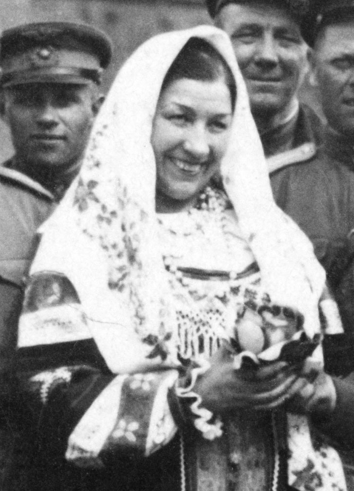 Лидия Русланова в Берлине в 1945 году